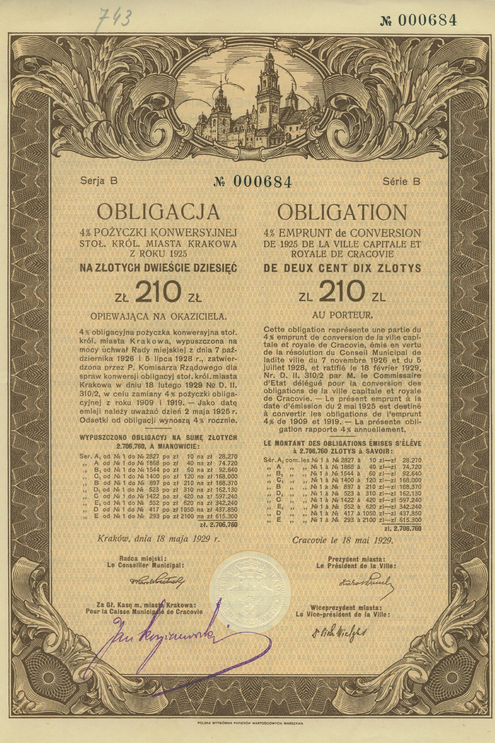 Municipal bond (210 złotys) issued by town Kraków, 1929